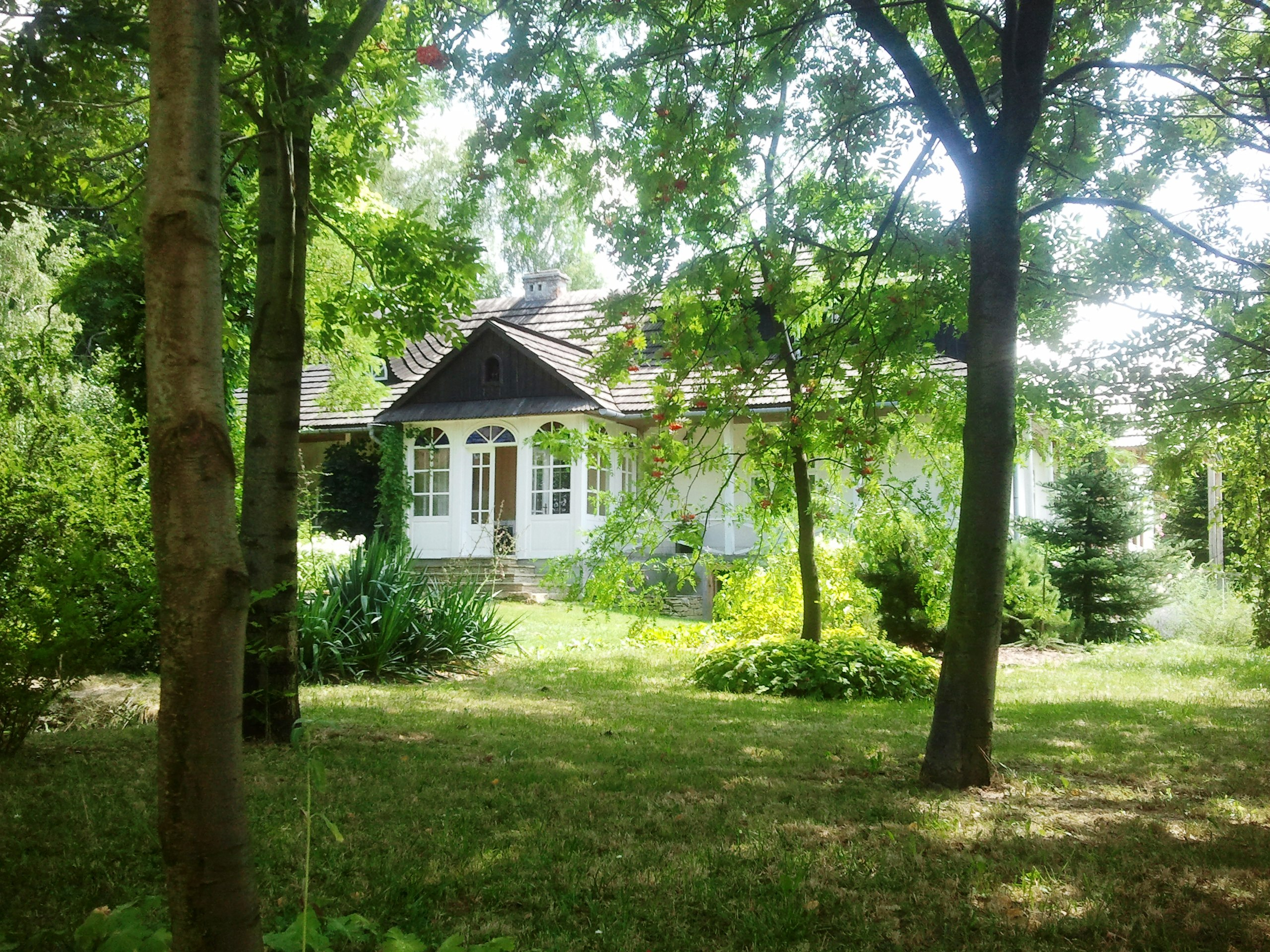 Kwiatonowice, ogród dworski, XVIII, XIX